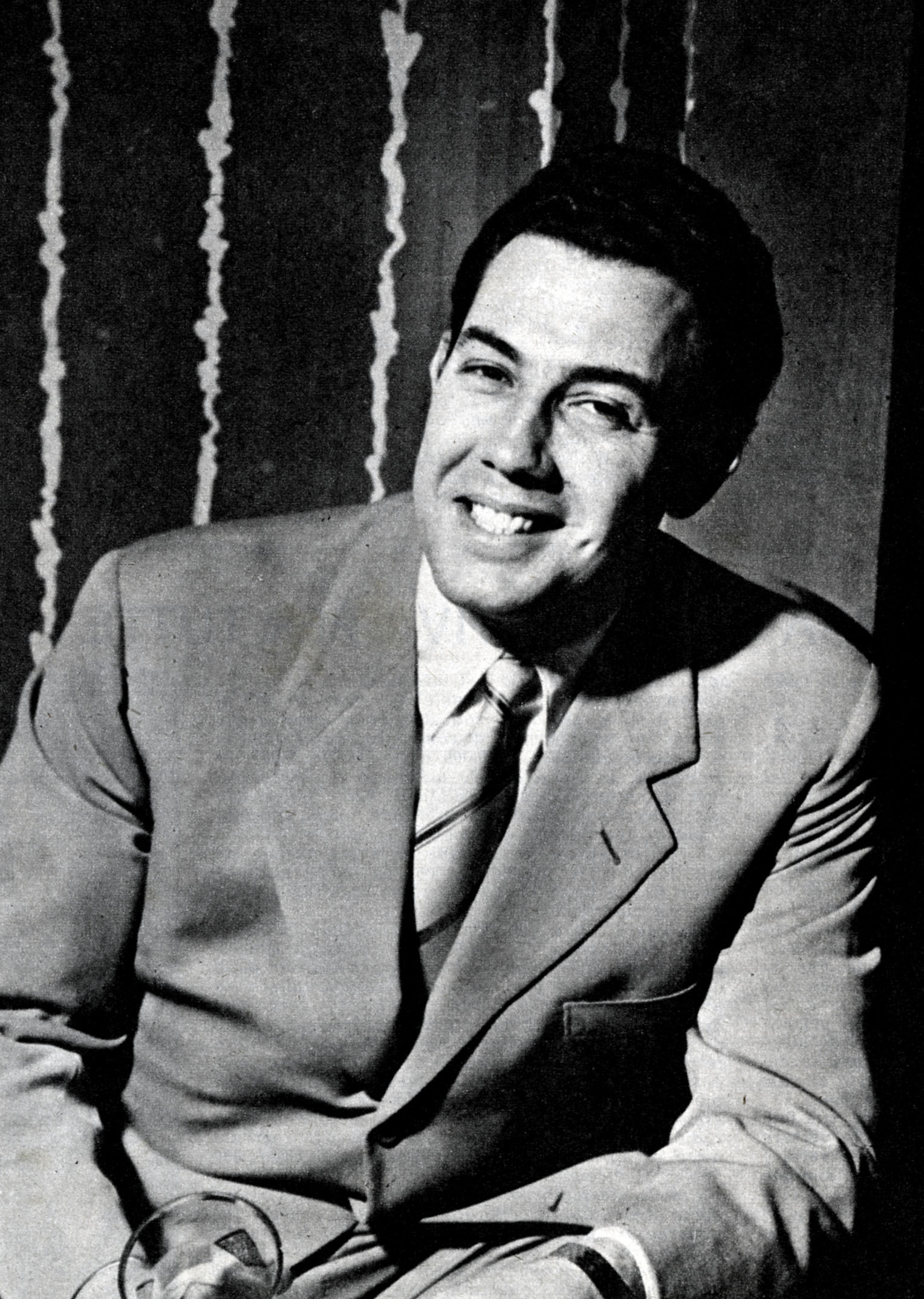 photo from magazine Radiocorriere (1961)